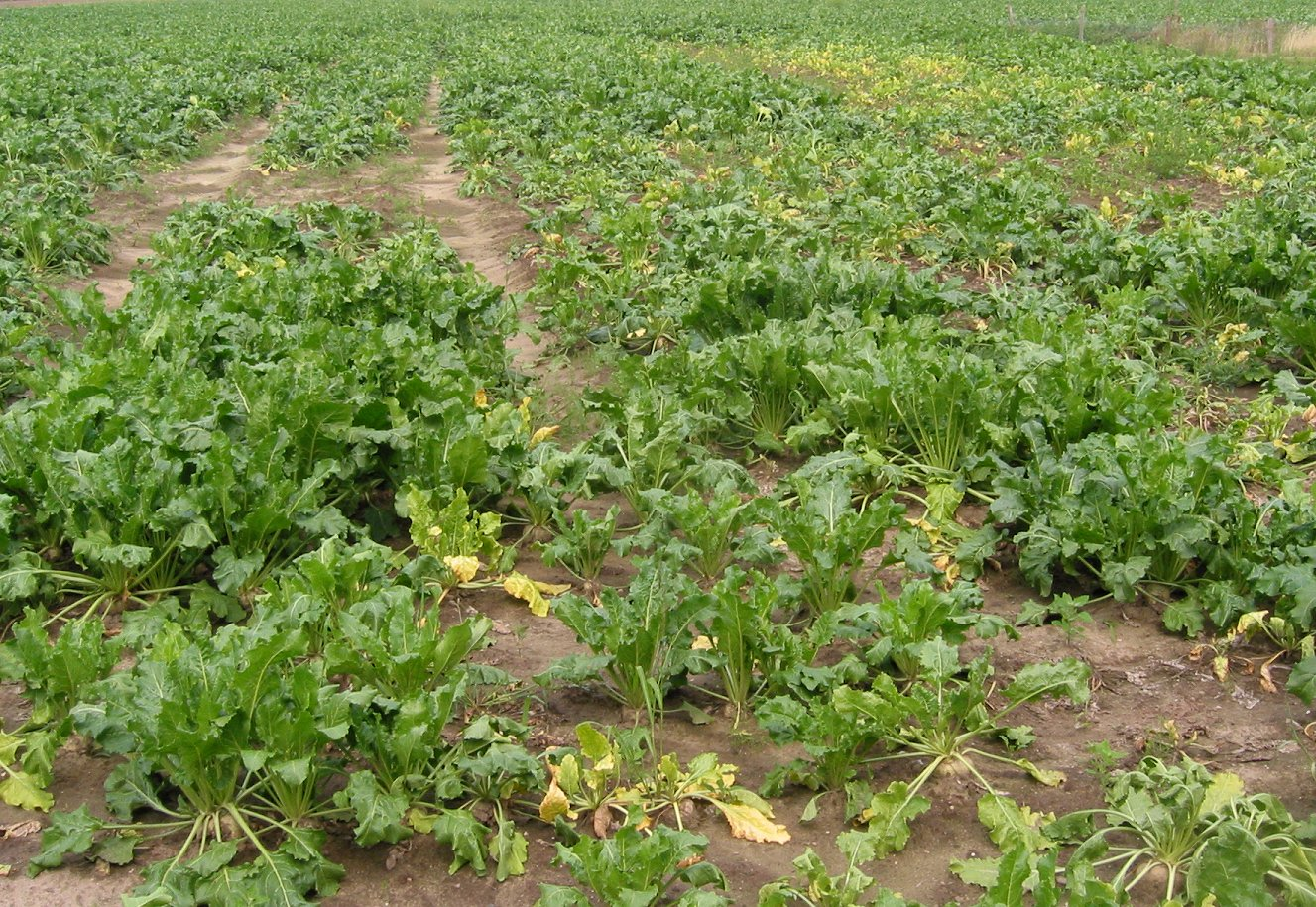 Suikerbiet (Beta vulgaris) structuurschade